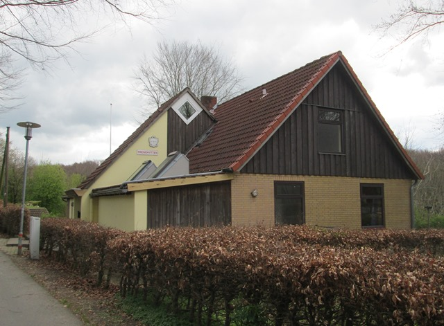 FDF's Trenehytten i Tarp, Sydslesvig